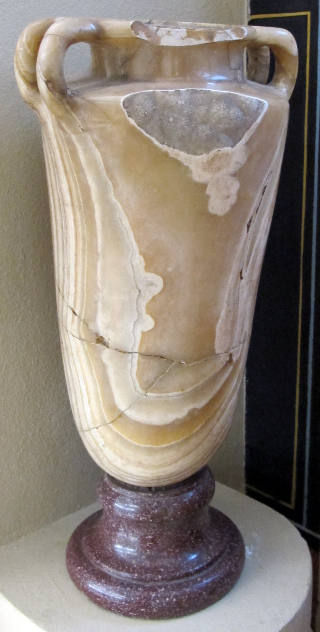 Museo civico archeologico (Bologna)